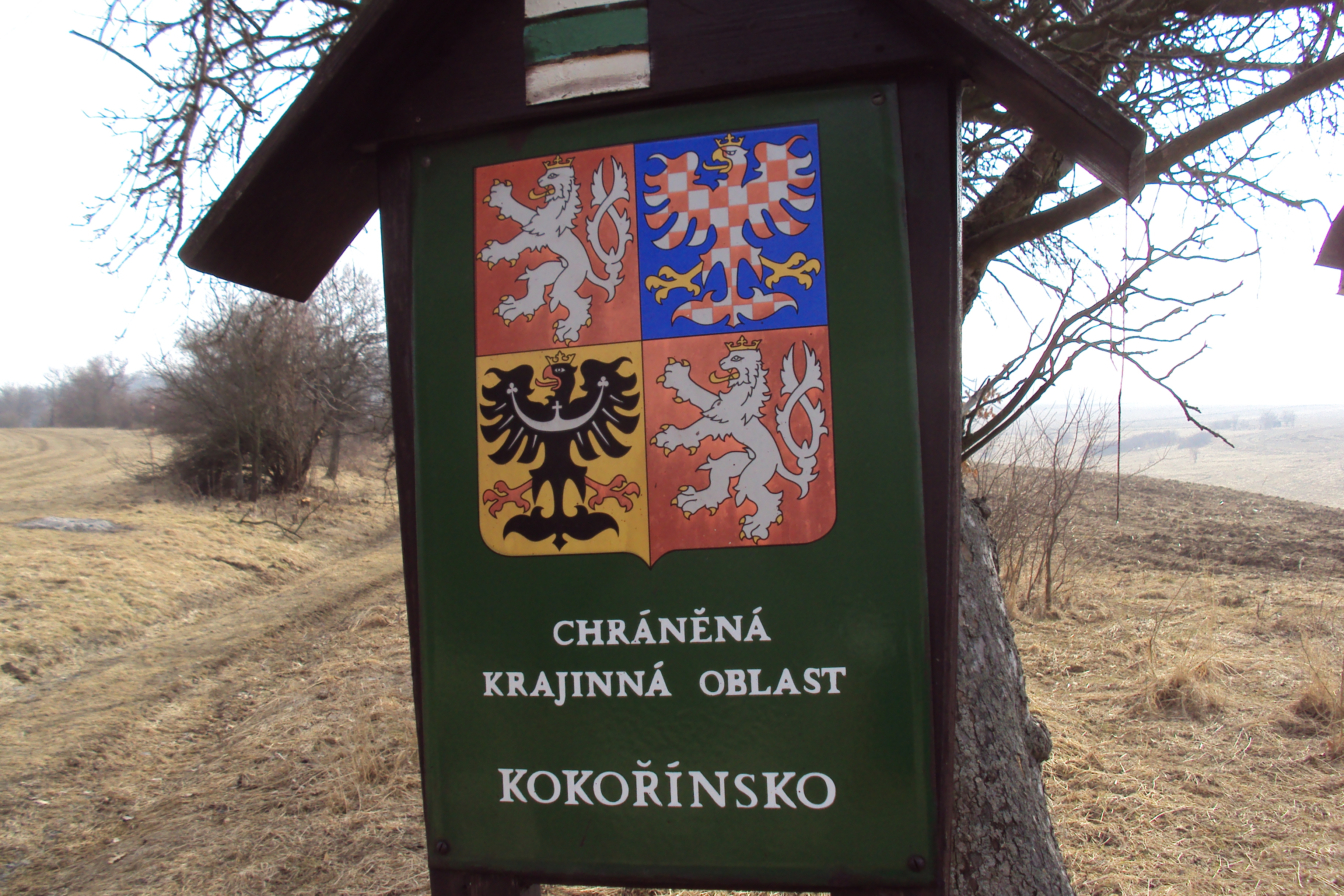 Univerzální označení hranice CHKO Kokořínsko